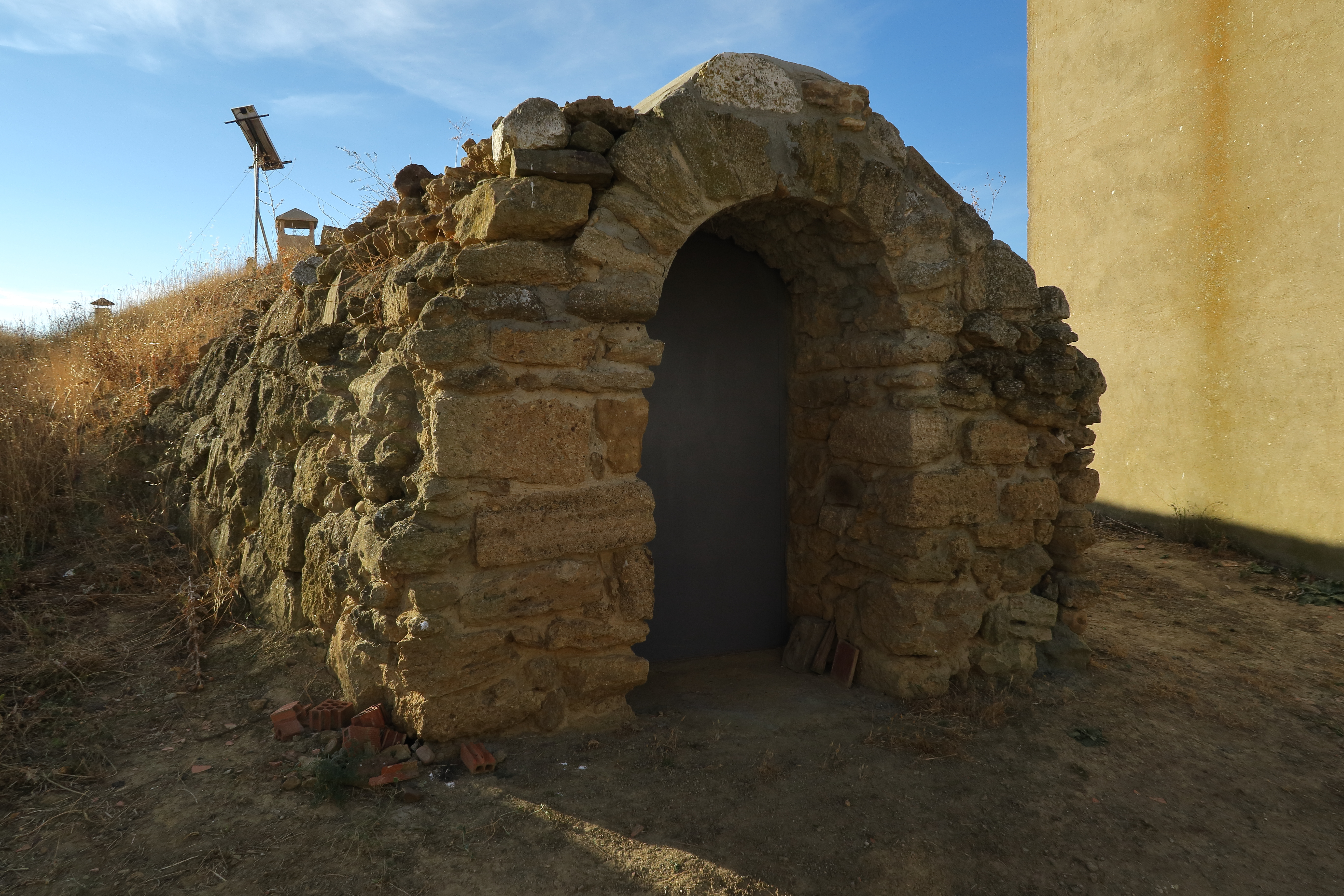 Revellinos, camino de las bodegas, 03